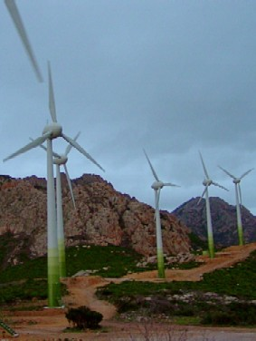 Enercon Wind Parc at Calenzana in Corsica.